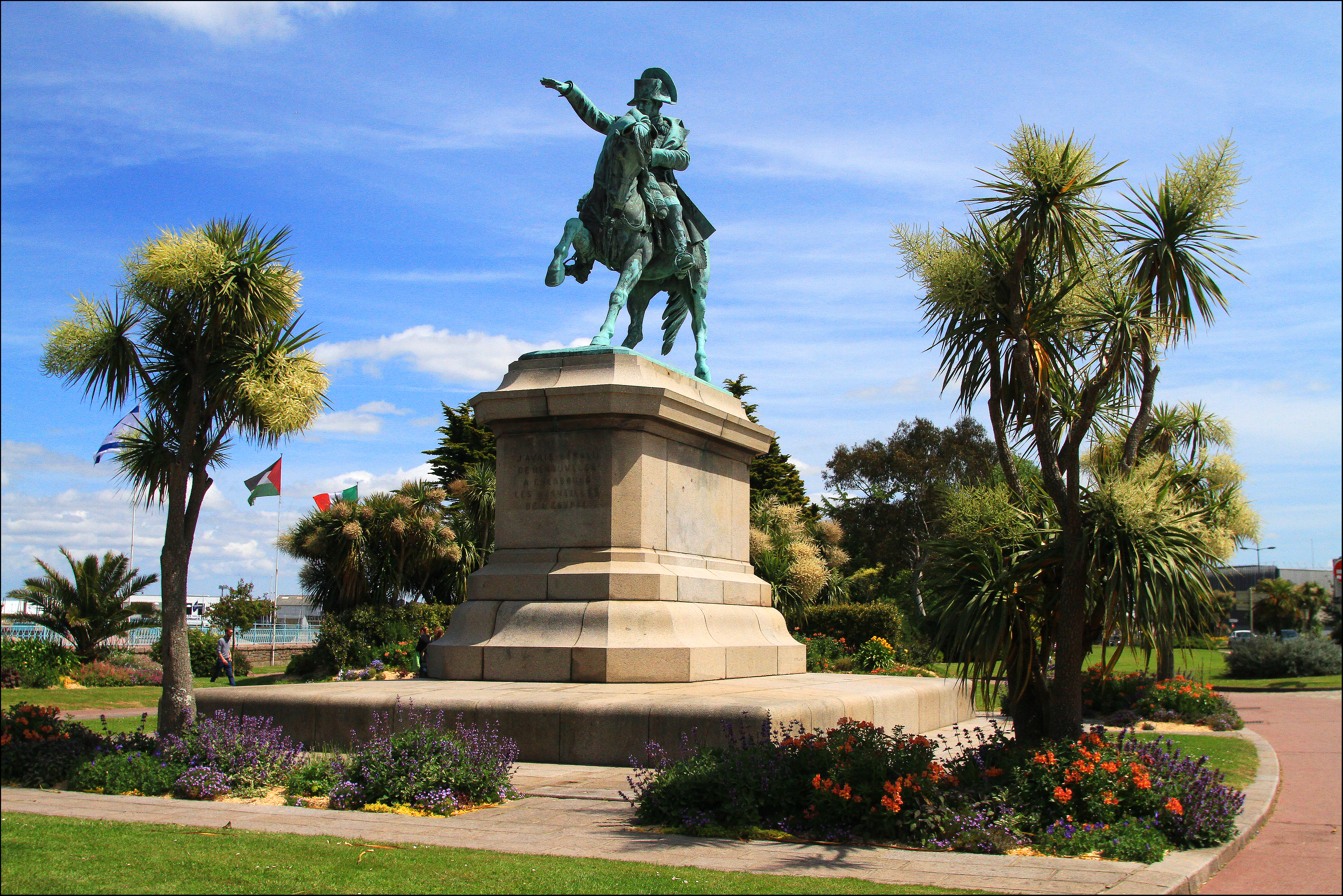 La statue de Napoléon 1er a été inaugurée le 8 août 1858 par l’Empereur Napoléon III et l’Impératrice Eugénie. Elle est l’œuvre du sculpteur local Armand Le Véel. L’Empereur désigne le port militaire et non l’Angleterre ! Sur son socle sont gravés les mots de Napoléon 1er : « j’avais résolu de renouveler à Cherbourg les merveilles de l’Egypte ». C’est-à-dire élever une pyramide (la batterie Napoléon au centre de la grande digue) et de creuser un lac Moéris (l’avant-port).